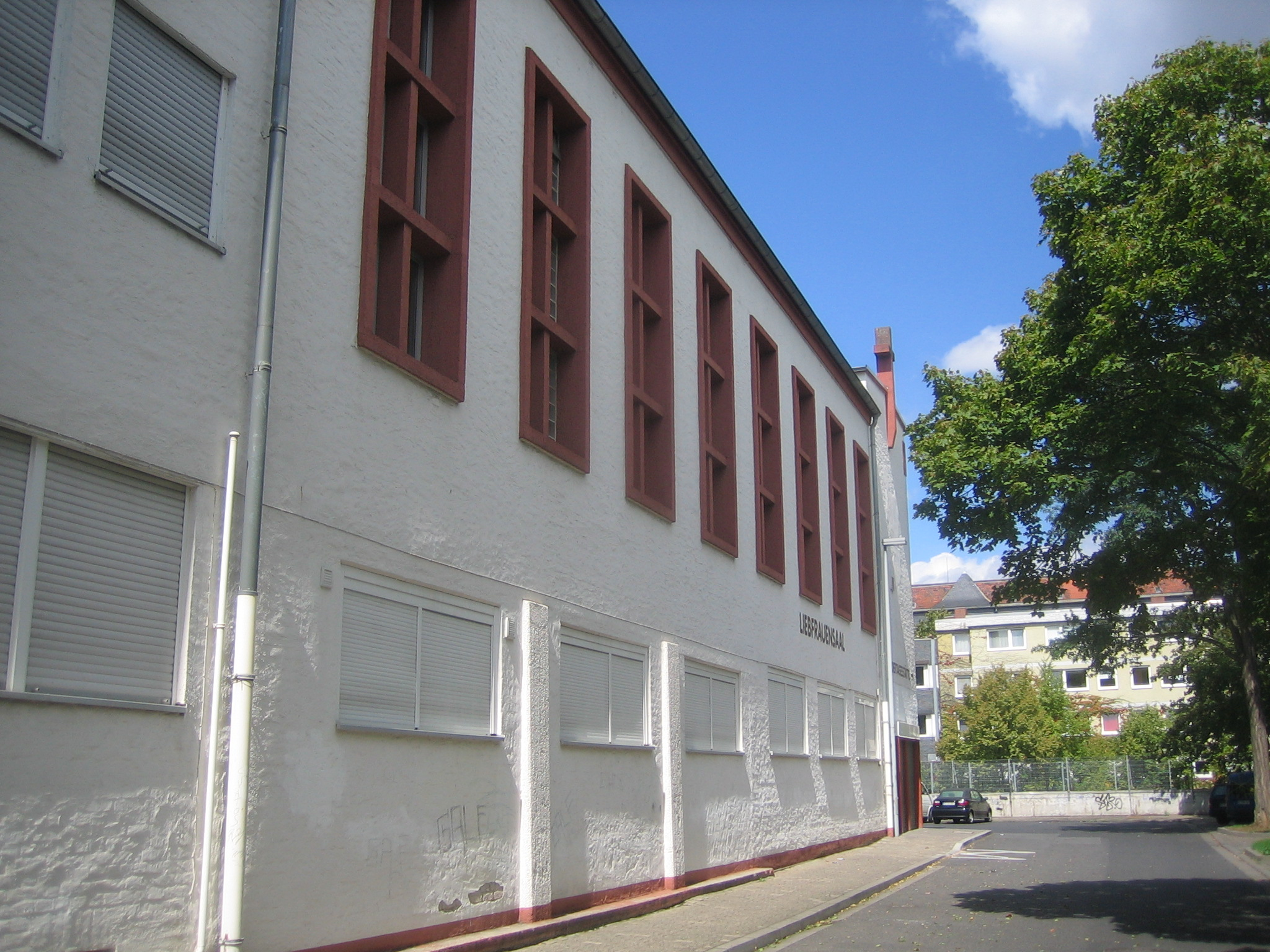 Das Liebfrauensaal genannte Gemeindehaus der Neustadtpfarrei Liebfrauen, Mainz. Die hohen Fenster erinnern an Sandstein, sind jedoch aus Beton.